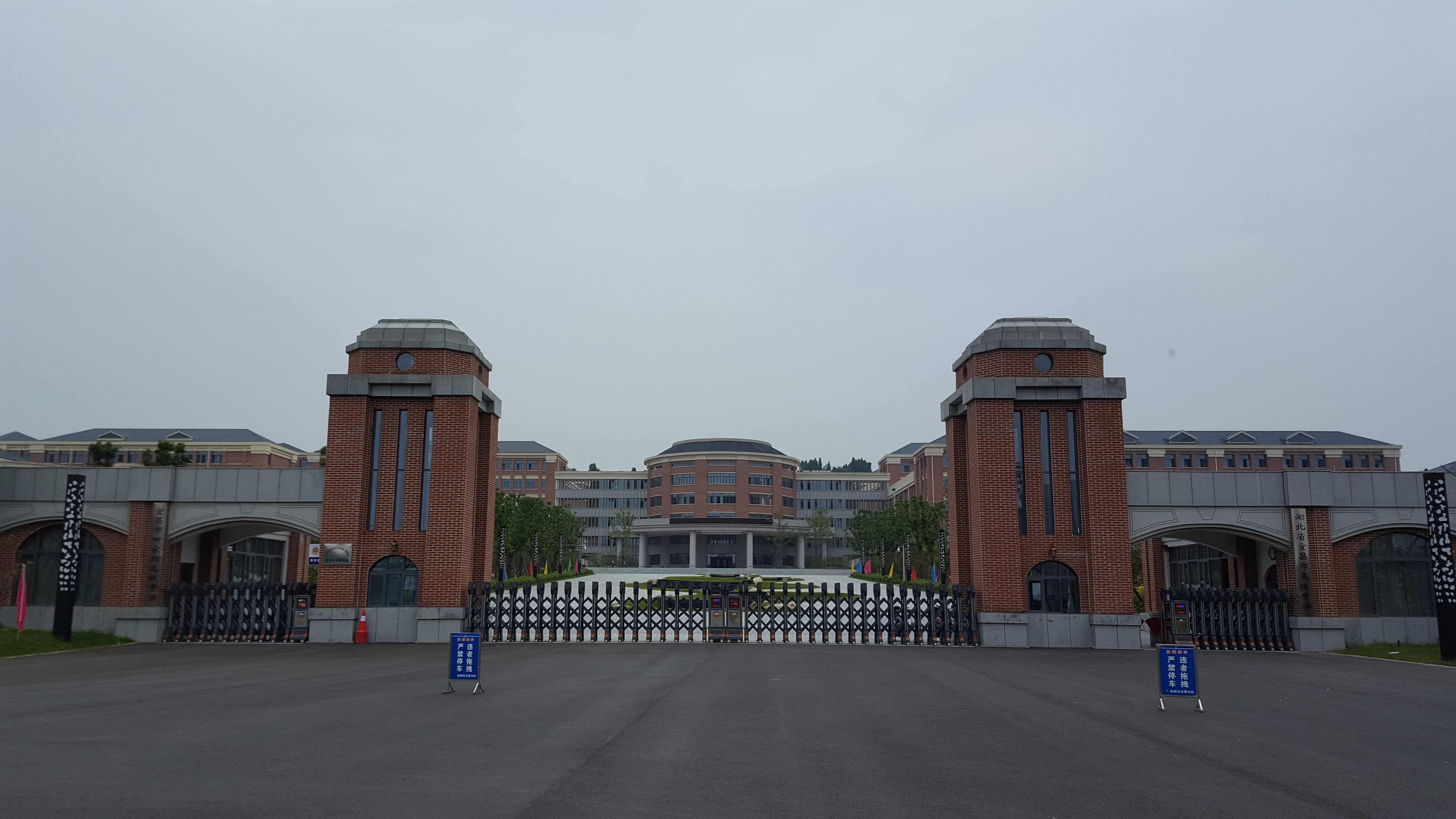 中文（中国大陆）: 夷陵中学新校区正门